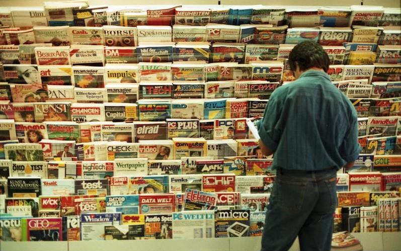 Juni 1988 Göttingen- Fußgängerzone